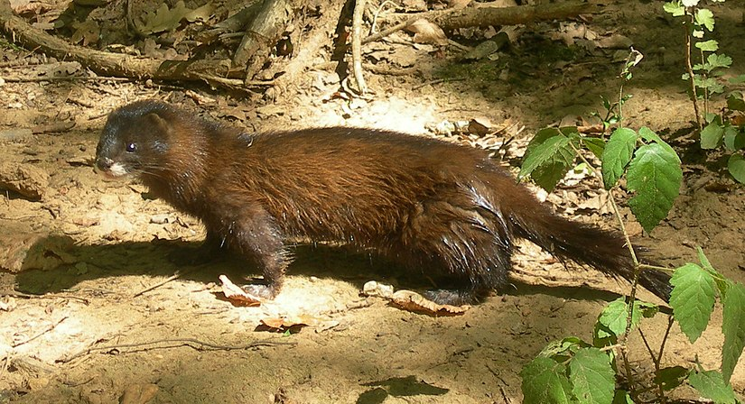 fgvt